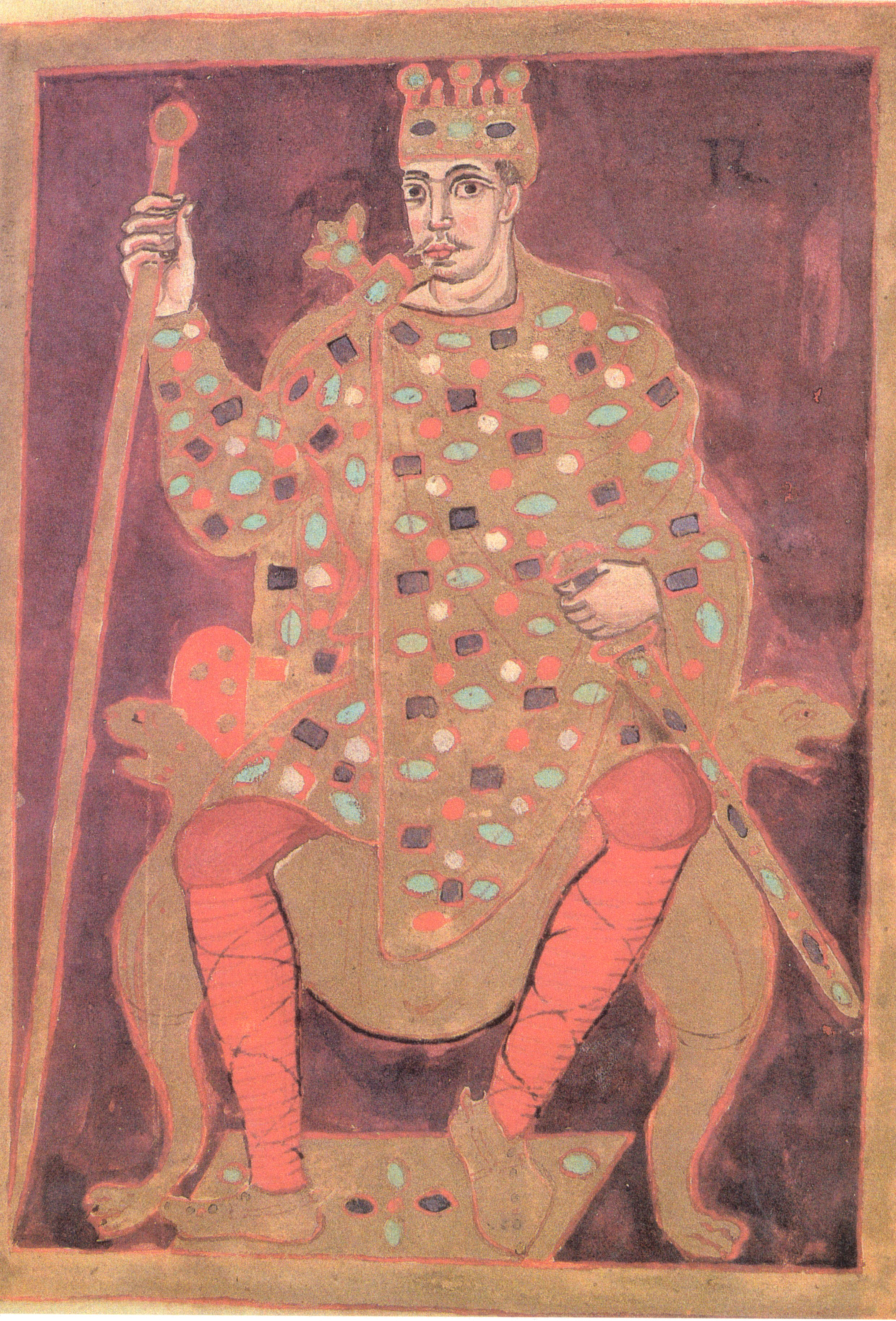 London, British Library, Ms Add 37768 (4r) um 842 Lothar I